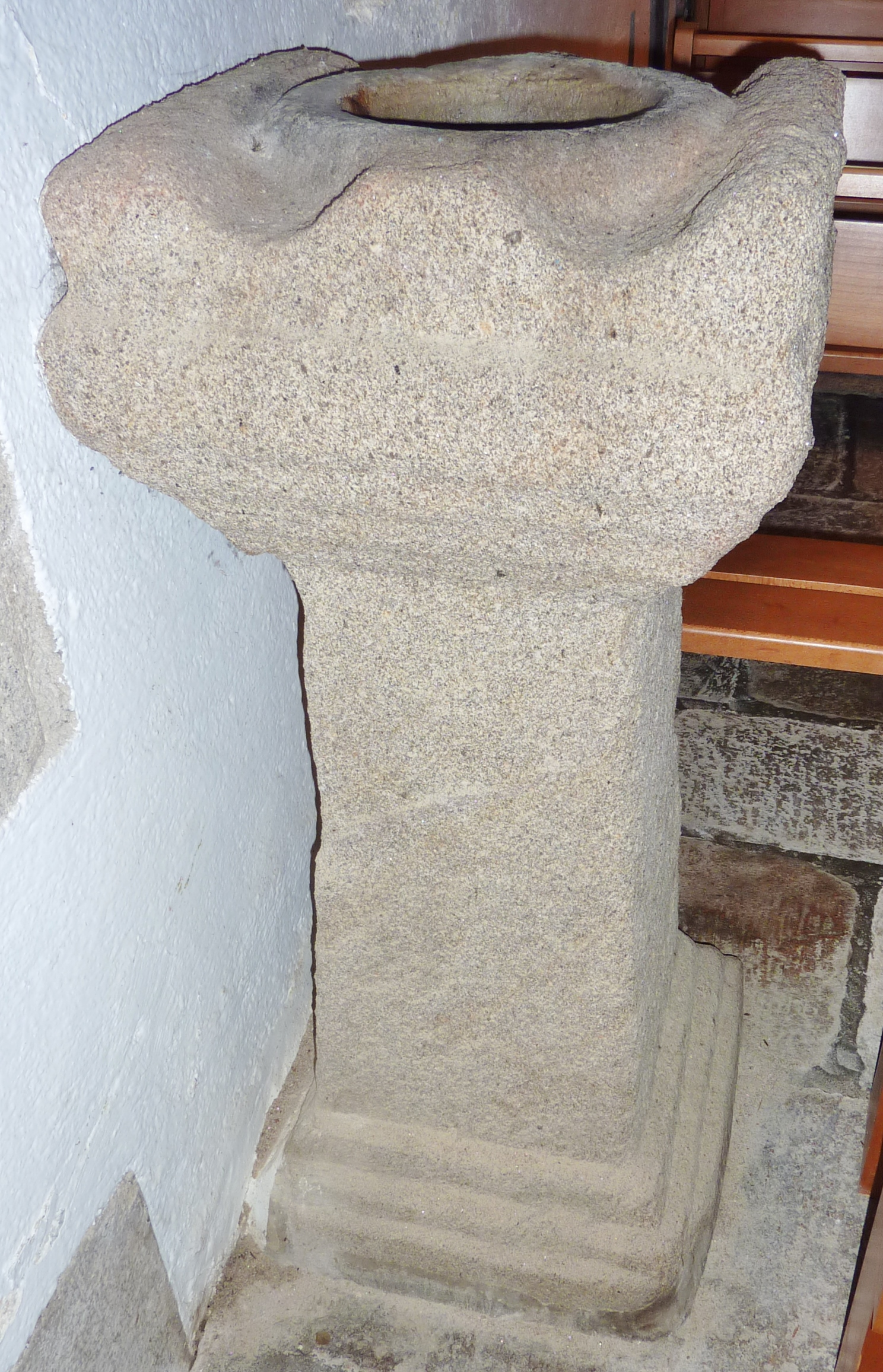 Gouesnach : église paroissiale Saint-Pierre, ancien autel païen gallo-romain réemployé en bénitier (stèle moulurée d'un peu plus de 1 mètre de hauteur). Cet ancien autel se trouvait dans le village de Kérincuff (anciennement Ker-Ilis en breton [="Hameau de l'église"). Il servait à mettre des charbons ardents sur lesquels était jeté de l'encens.